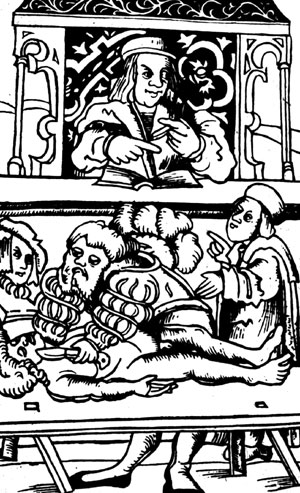 Estampe représentant un théâtre anatomique temporaire dans l'Anatomia Mundini parue à Rostock en 1513.